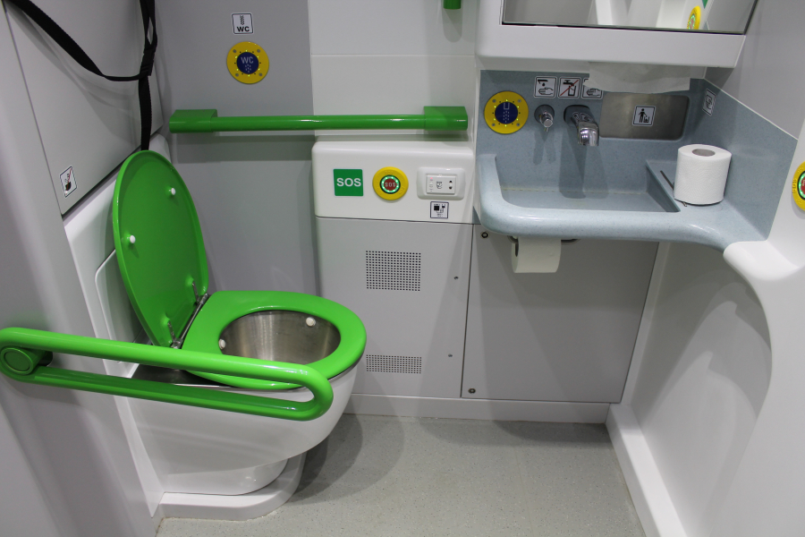 Toaleta przystosowana do potrzeb osób niepełnosprawnych w piętrowym wagonie sterowniczym Pesa Sundeck 316B-002.